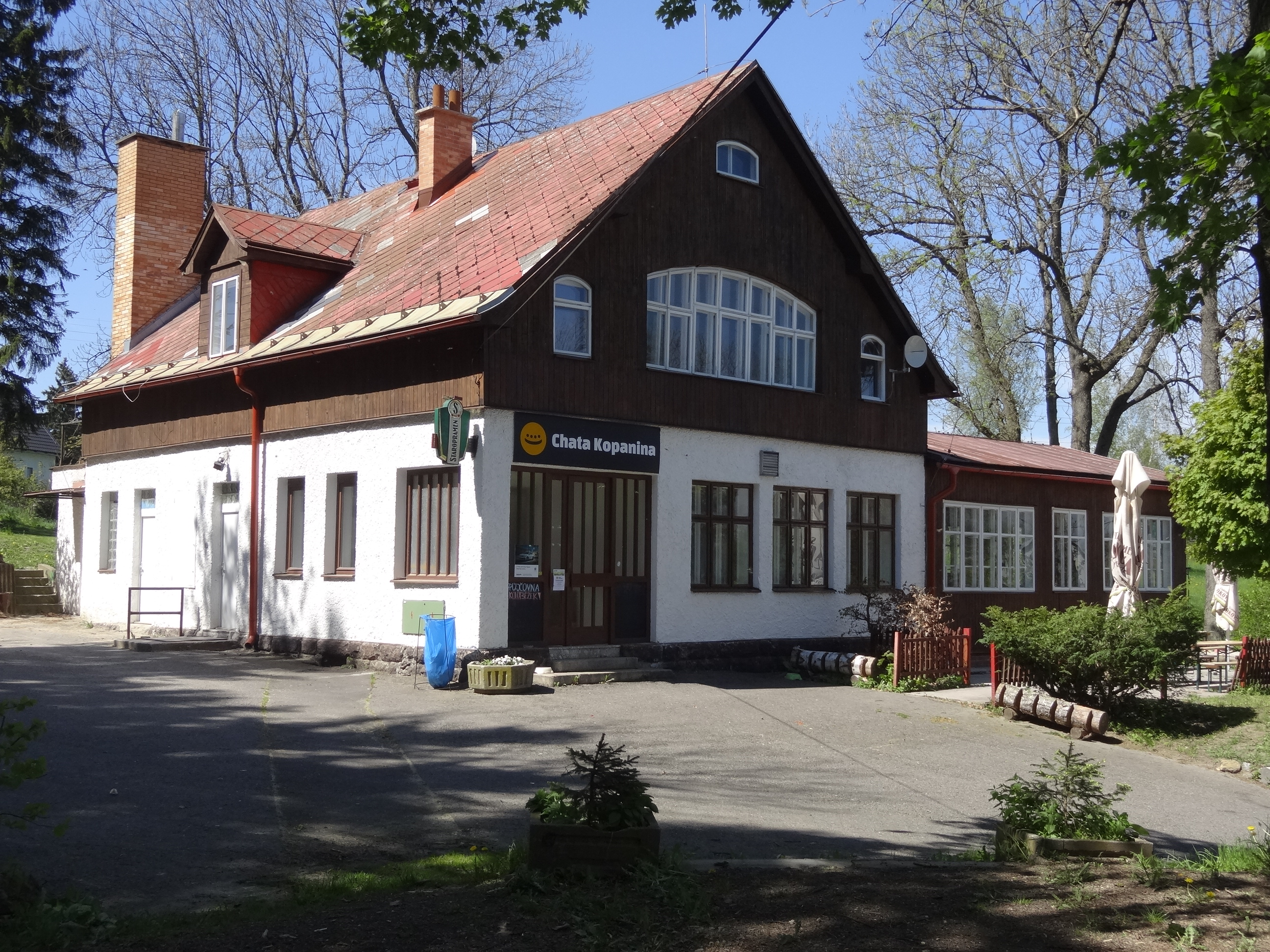 Kopanina (u Pulečného na Jablonecku) - turistická chata čp. 6